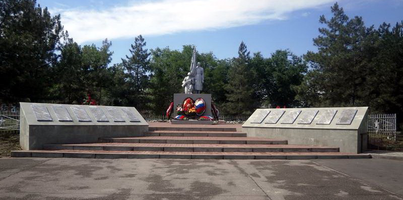 Памятник на братской могиле хутора Весёлый Веселовского района Ростовской области, современный вид